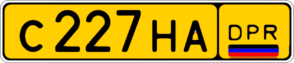 Госномера для пассажирских перевозок ДНР